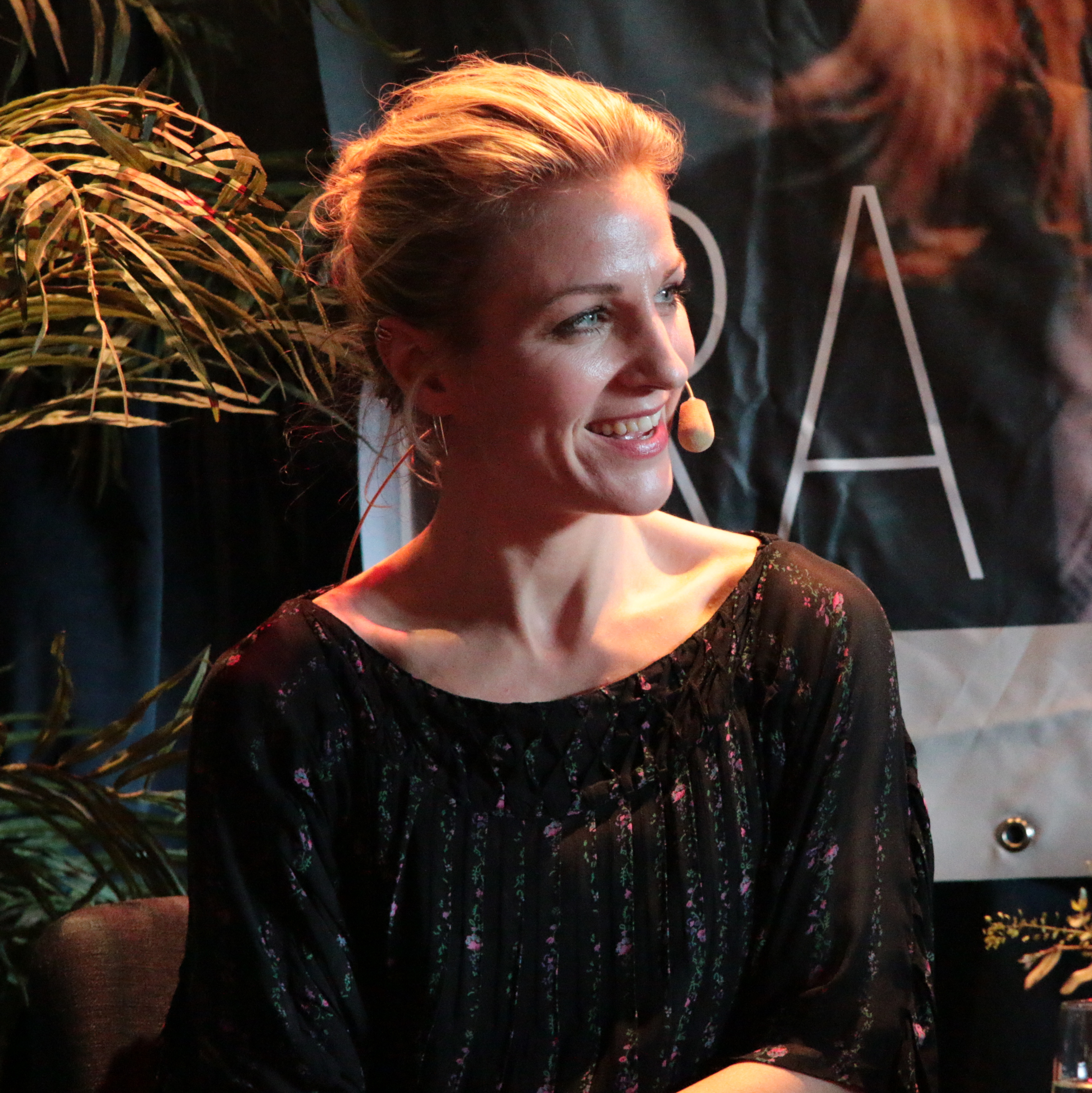 Medvirkende: Guri Solberg (Moderator) og Line Elvsåshagen (Gjest)